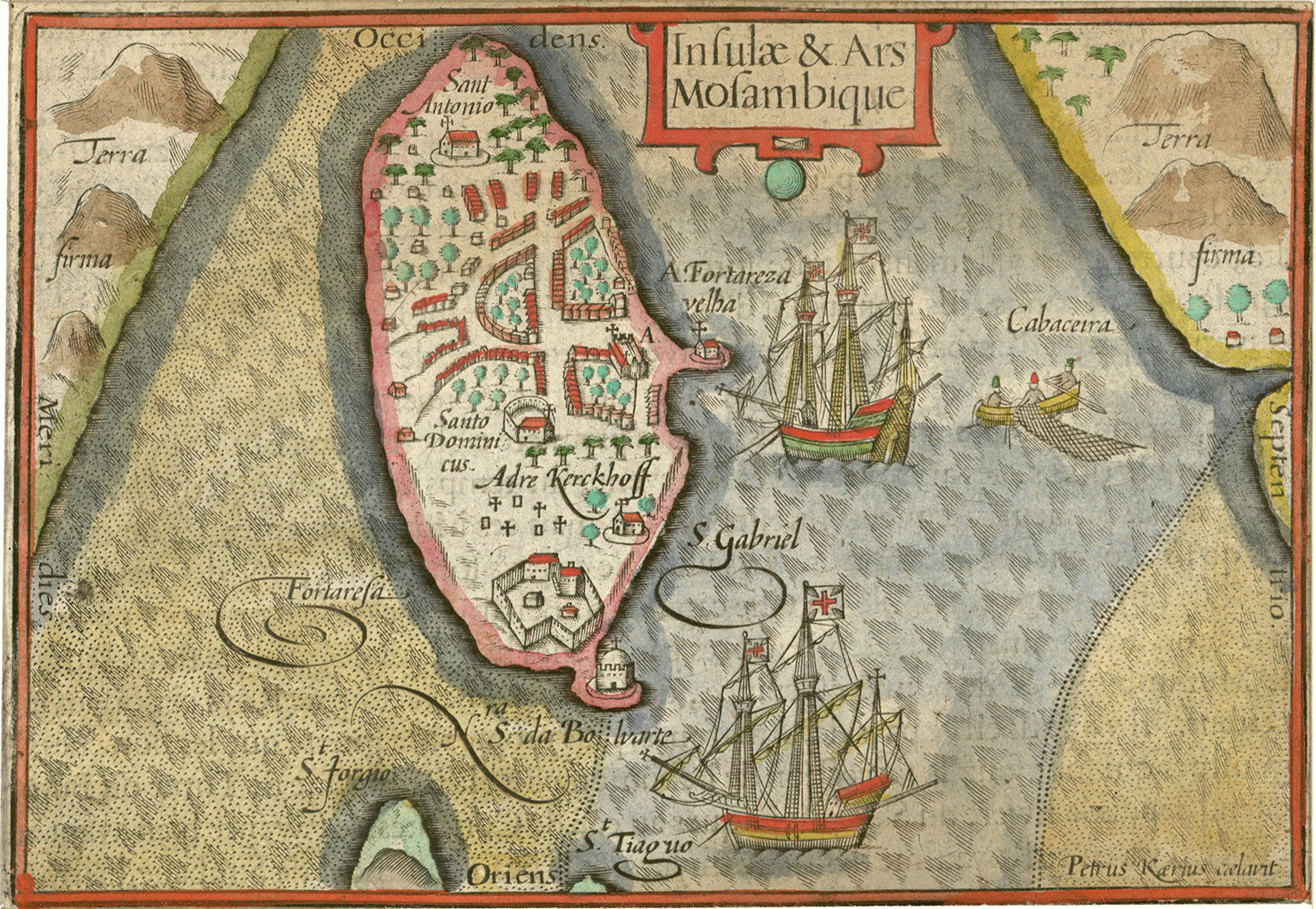 Kaartje van het eiland Mozambique